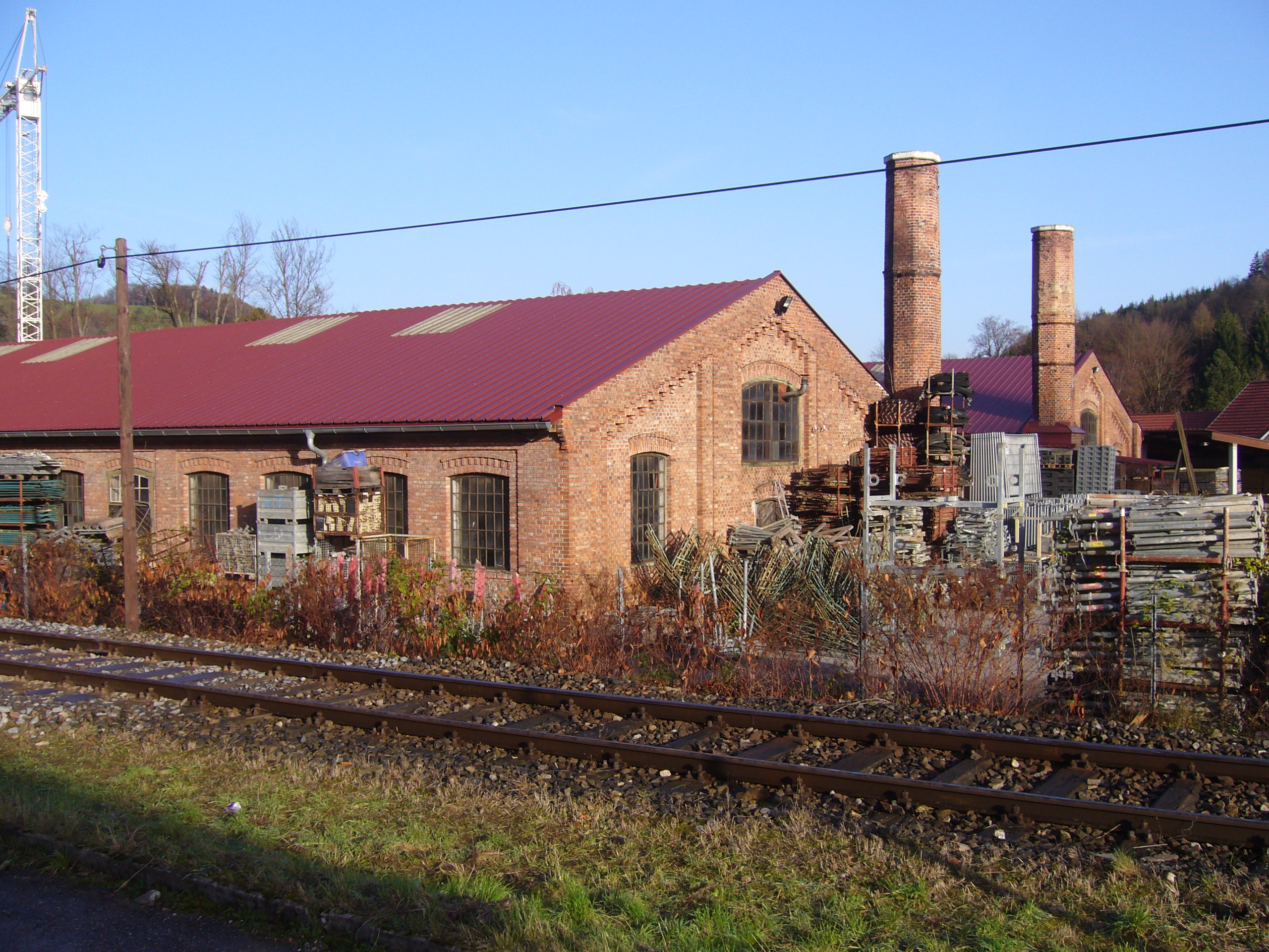 ehem fabrik in scheibbs neustift